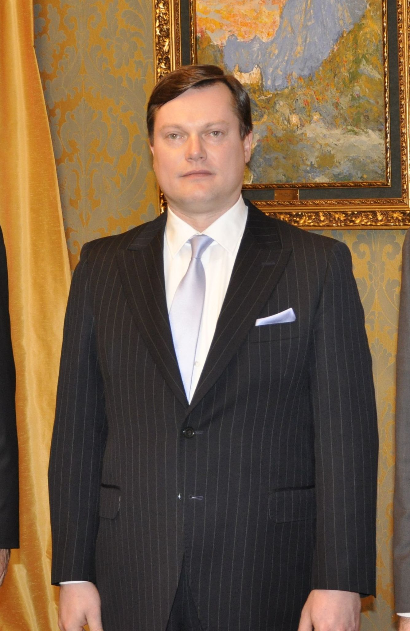 Arti Hilpus, Eesti suursaadik Montenegros